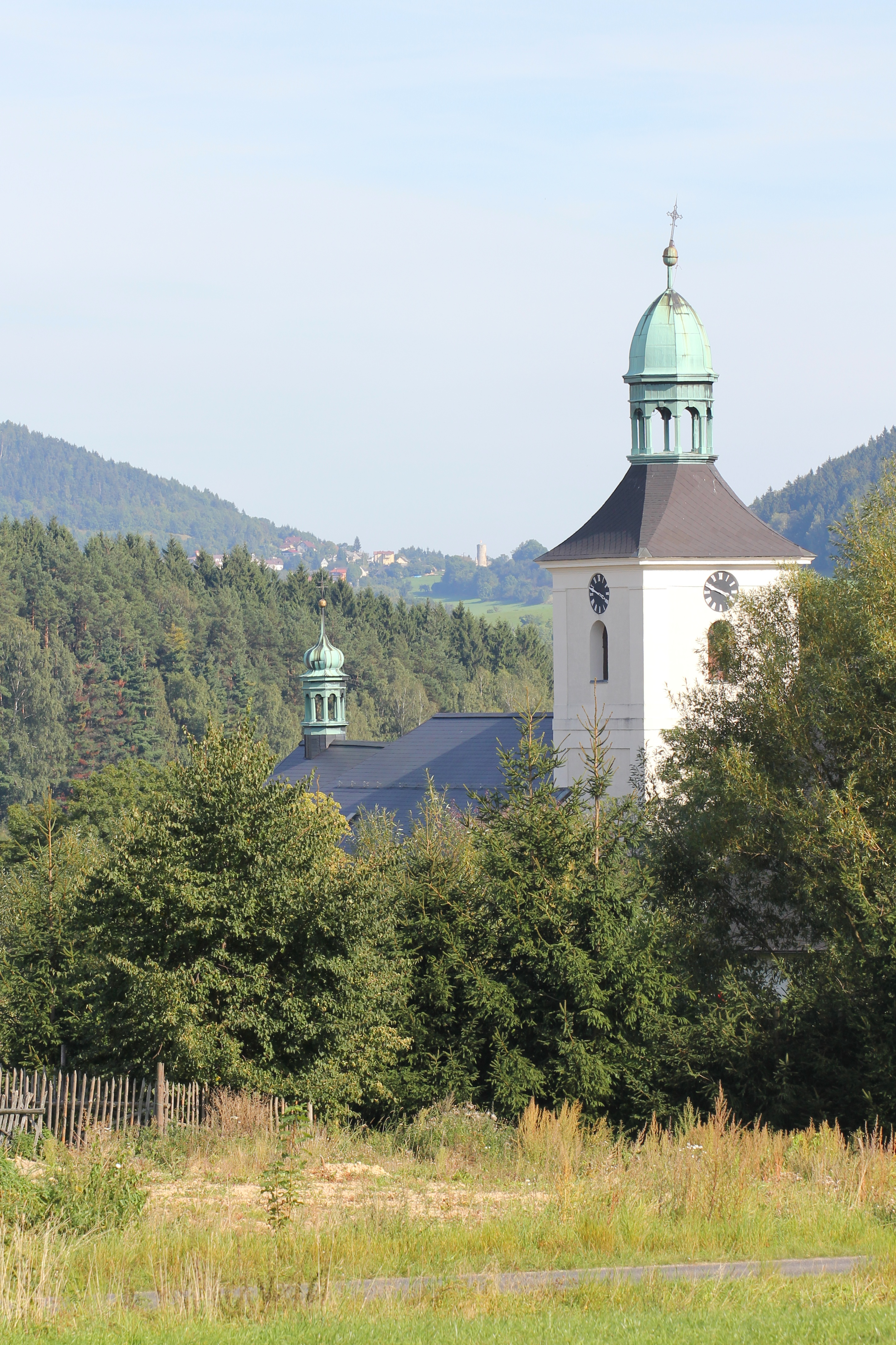 Kostel sv. Prokopa, Hodkovice nad Mohelkou